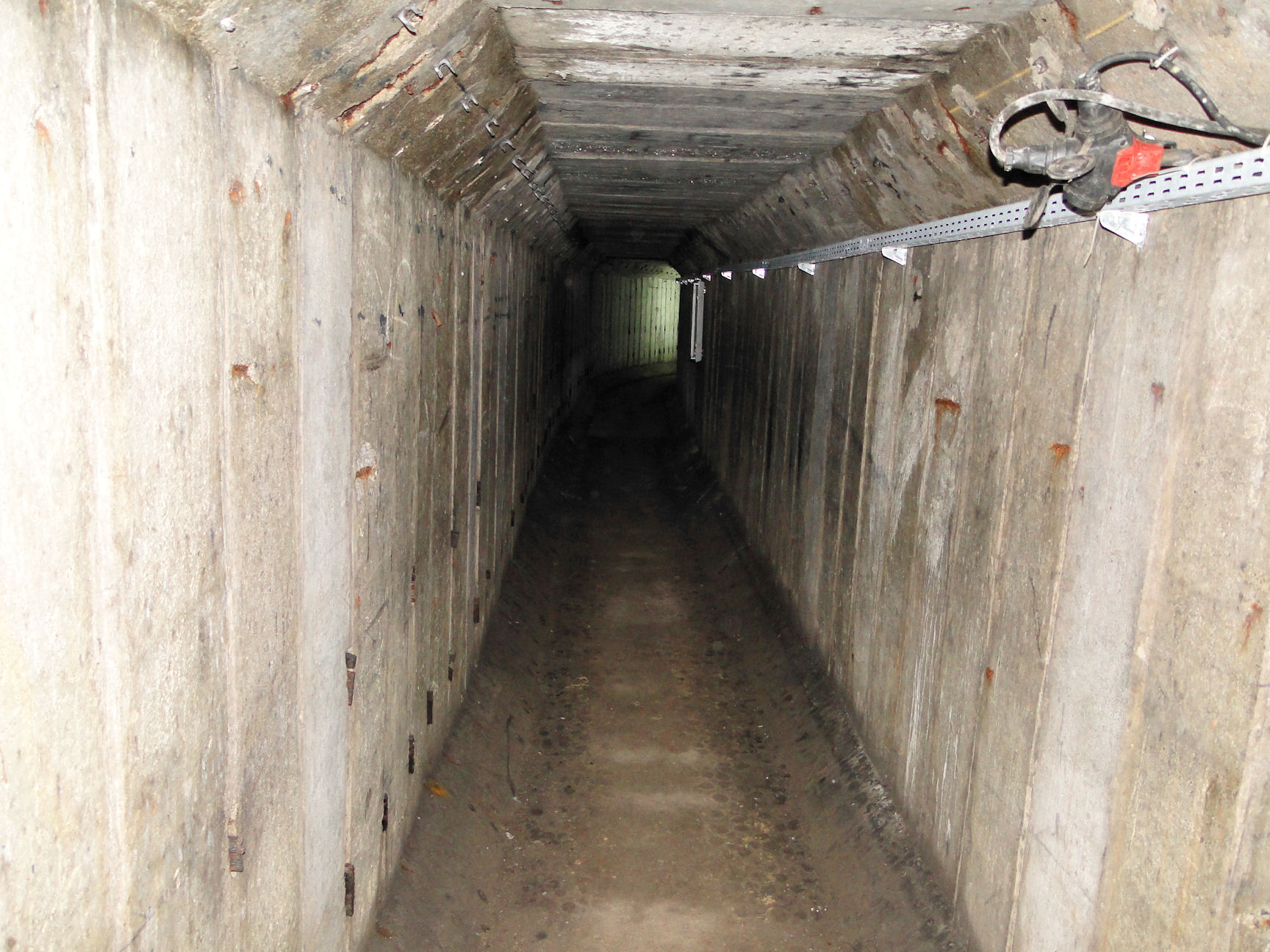 Podziemia nad Jeziorem Szmaragdowym